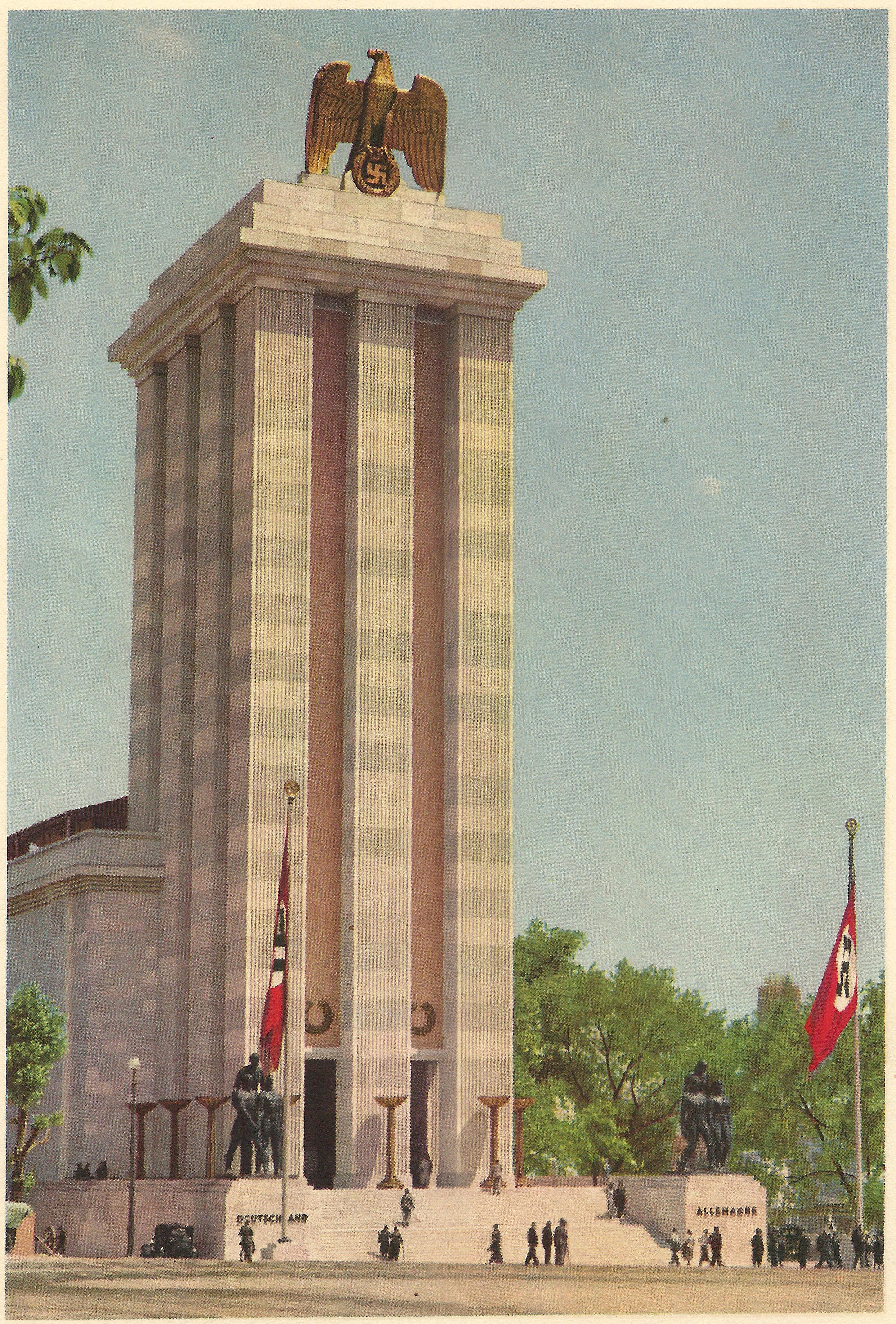 Exposition Internationale des Arts et Techniques dans la Vie Moderne (Paris-1937) ; le pavillon de l'Allemagne.